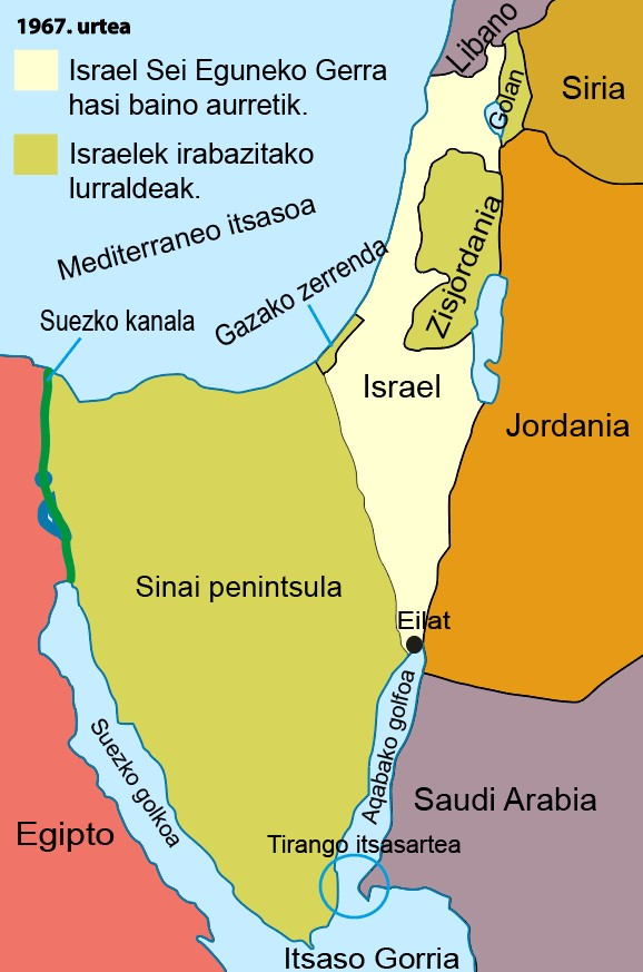 Sei Egunetako Gerra